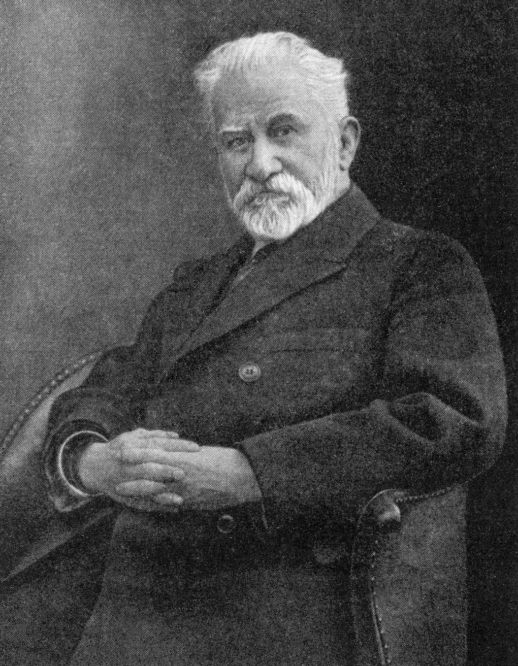 Дмитрий Анучин, русский географ